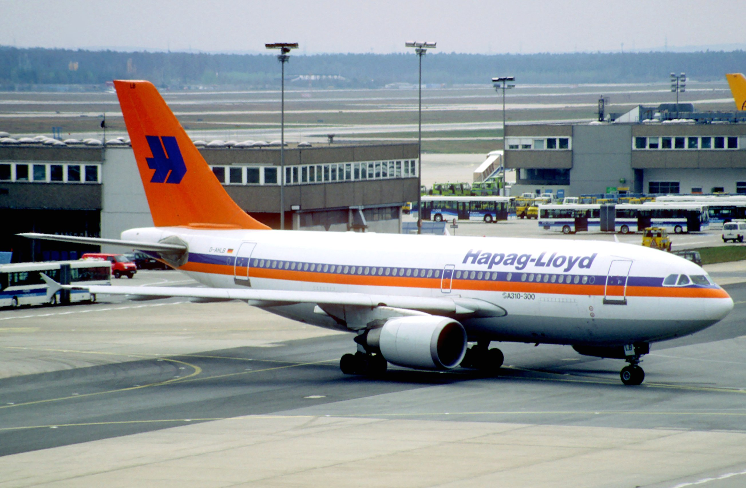 18ef - Hapag-Lloyd Airbus A310-304; D-AHLB@FRA;01.04.1998